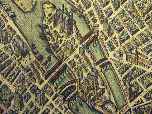 Die Ile de la Cité in Paris aus einer Ansicht des Jahres 1609 (Plan de Vassalieu)